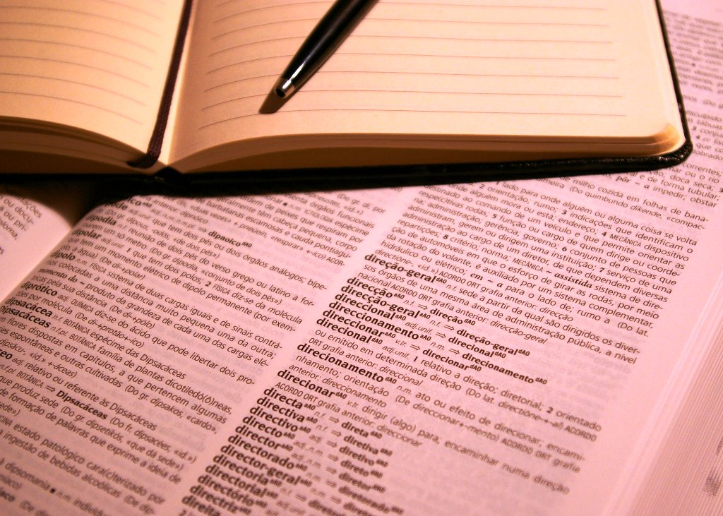 Bloco notas, esferográfica e dicionário.